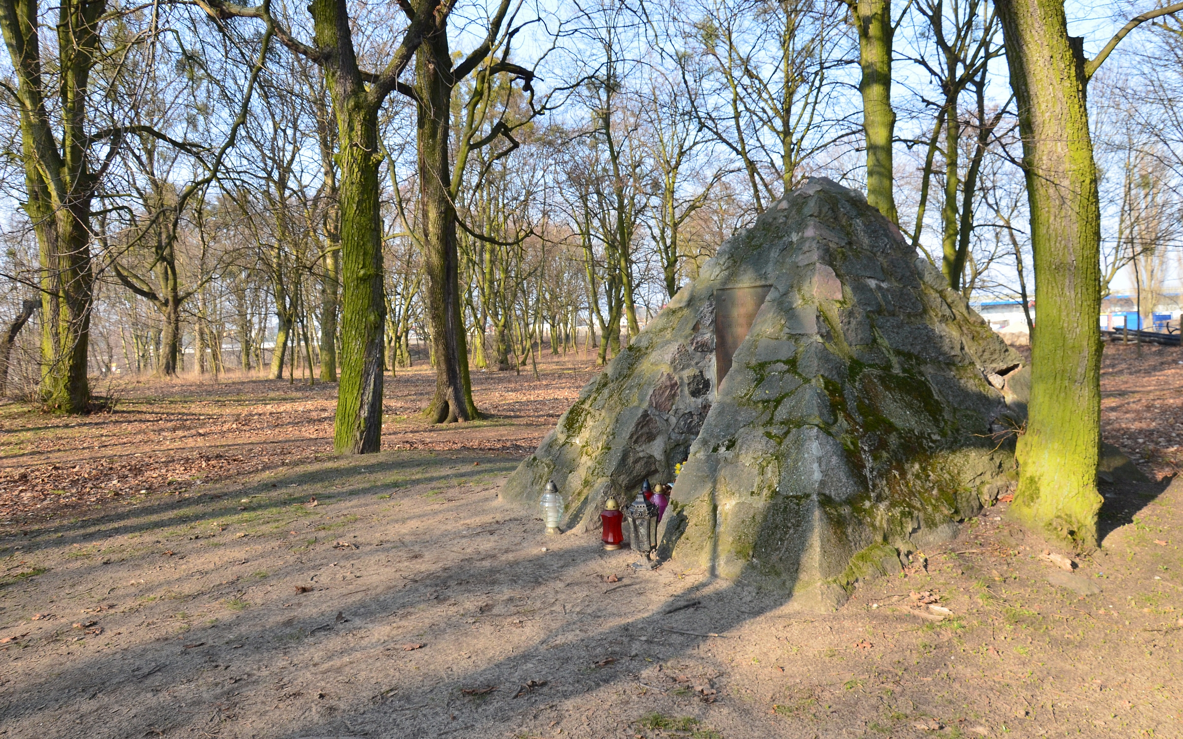 Cmentarz ewangelicki w Brodnicy, ul. Sądowa, 1798-1945